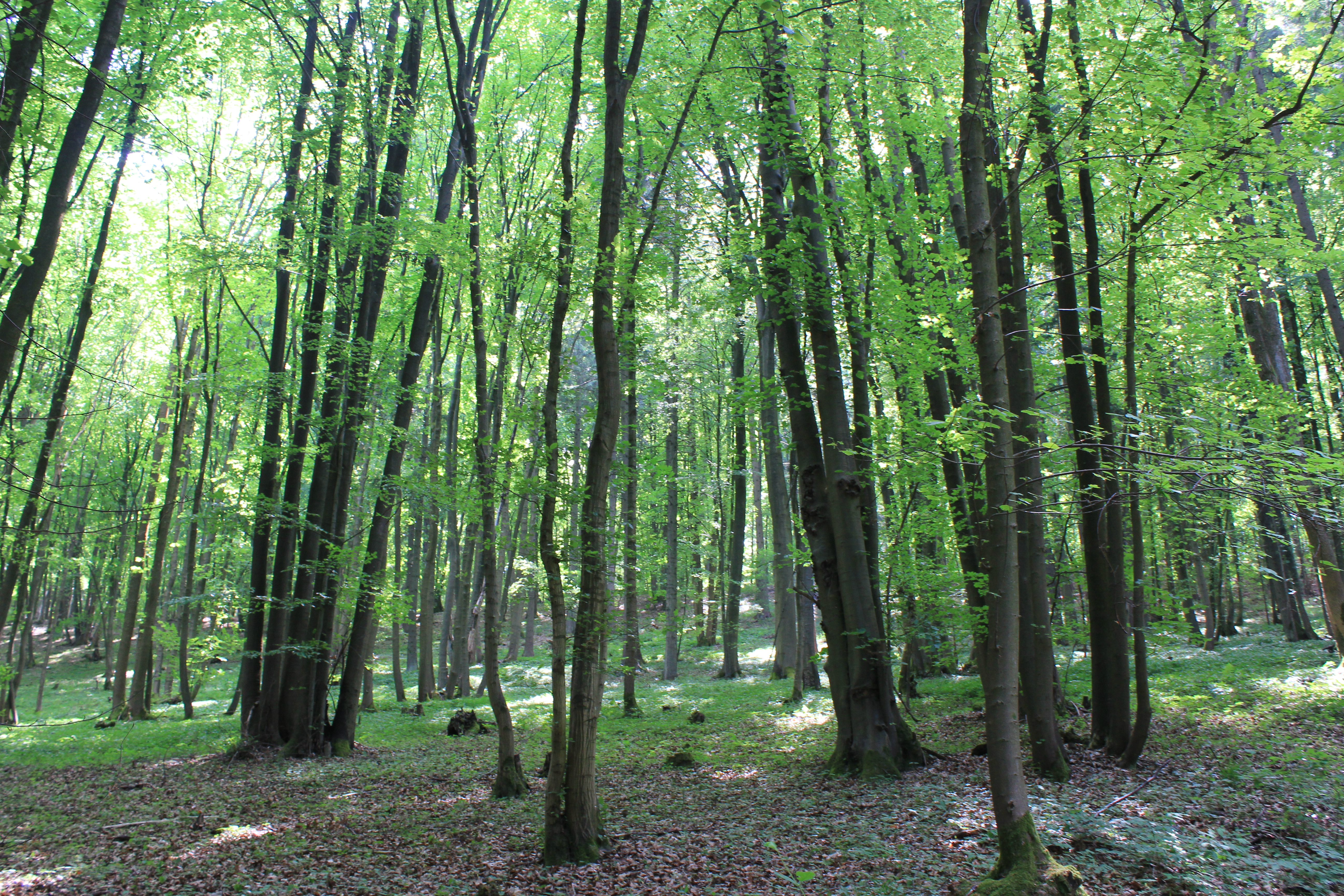 Buchenwald am Nordhang des Kordigasts